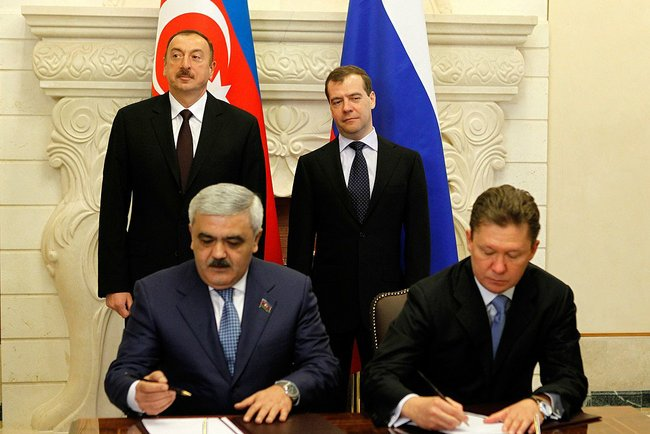 Встреча с Президентом Азербайджана Ильхамом Алиевым. В присутствии Дмитрия Медведева и Президента Азербайджана Ильхама Алиева председатель правления ОАО «Газпром» Алексей Миллер и председатель правления ГНКАР Ровнаг Абдуллаев (слева) подписали соглашение между «Газпром экспорт» и Государственной нефтяной компании Азербайджана (ГНКАР).